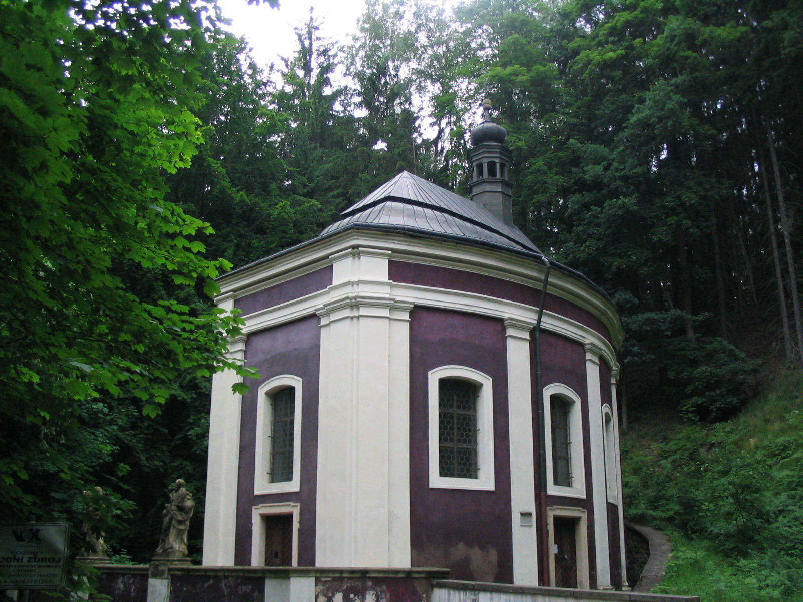 chapell in Klokočka, part of Bakov nad Jizerou, Czech Republic